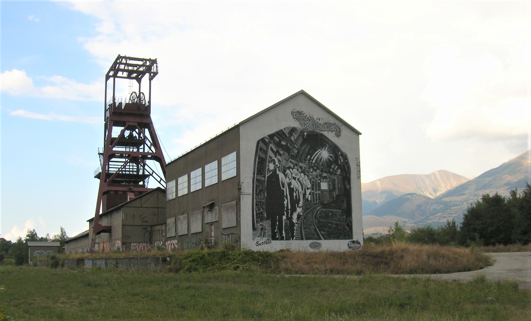 Puits du Villaret. Susville, Isère, AuRA, France.